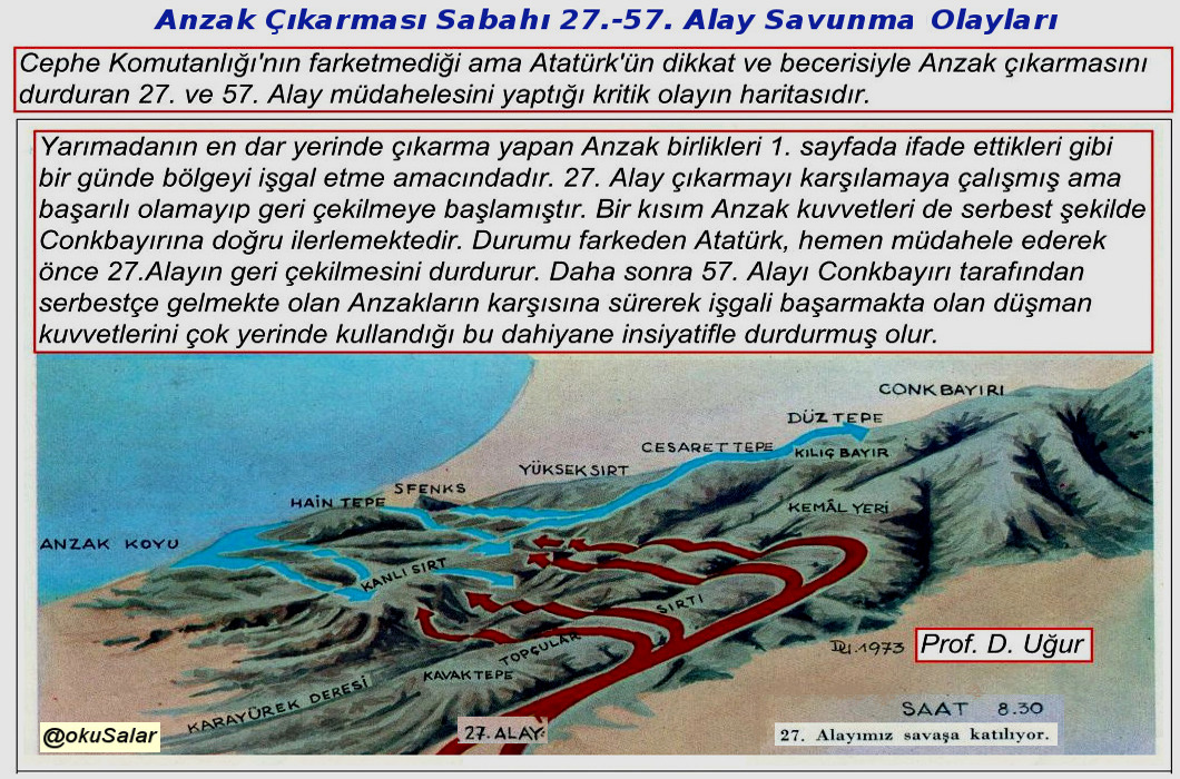 Anzak çıkarması sabahı 27. Alay bölgesi ve boş alanda ilerleyen düşmanı gösteren panaromik harita